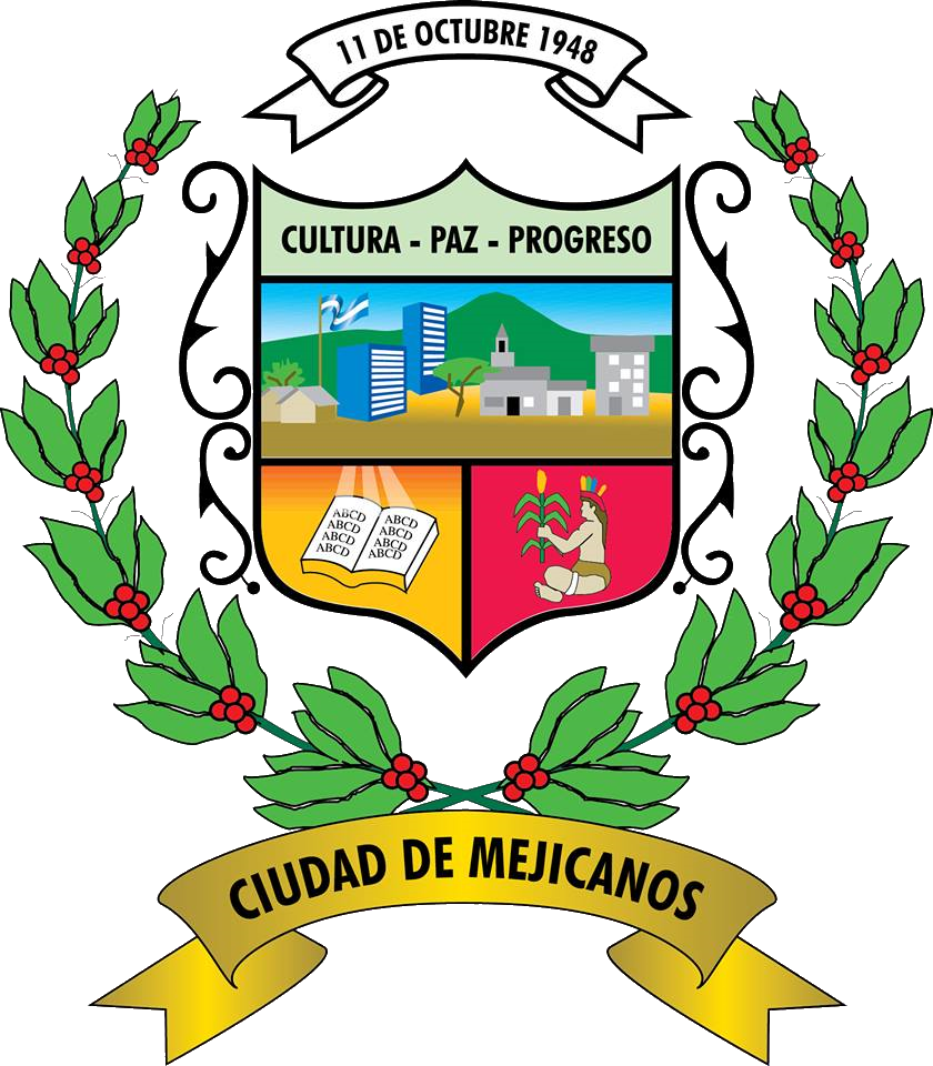 Escudo Municipal de Mejicanos